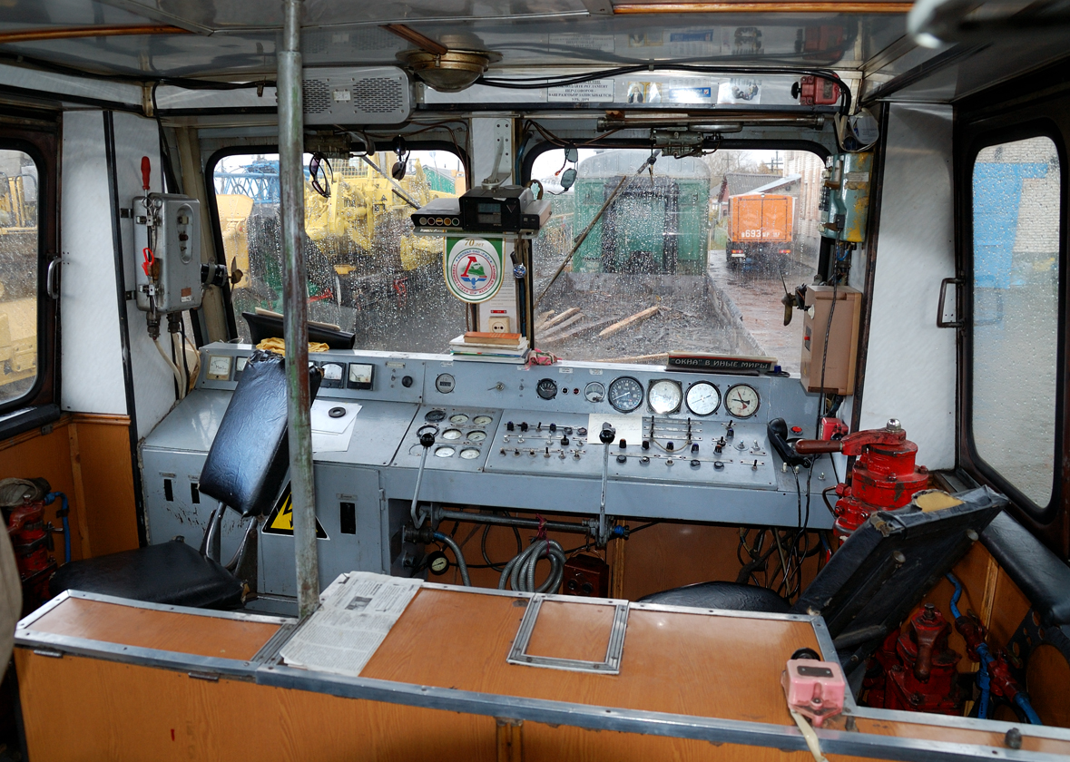 Кабина путейского мотовоза МПТ4, ст. Похвистнево, Самарская область